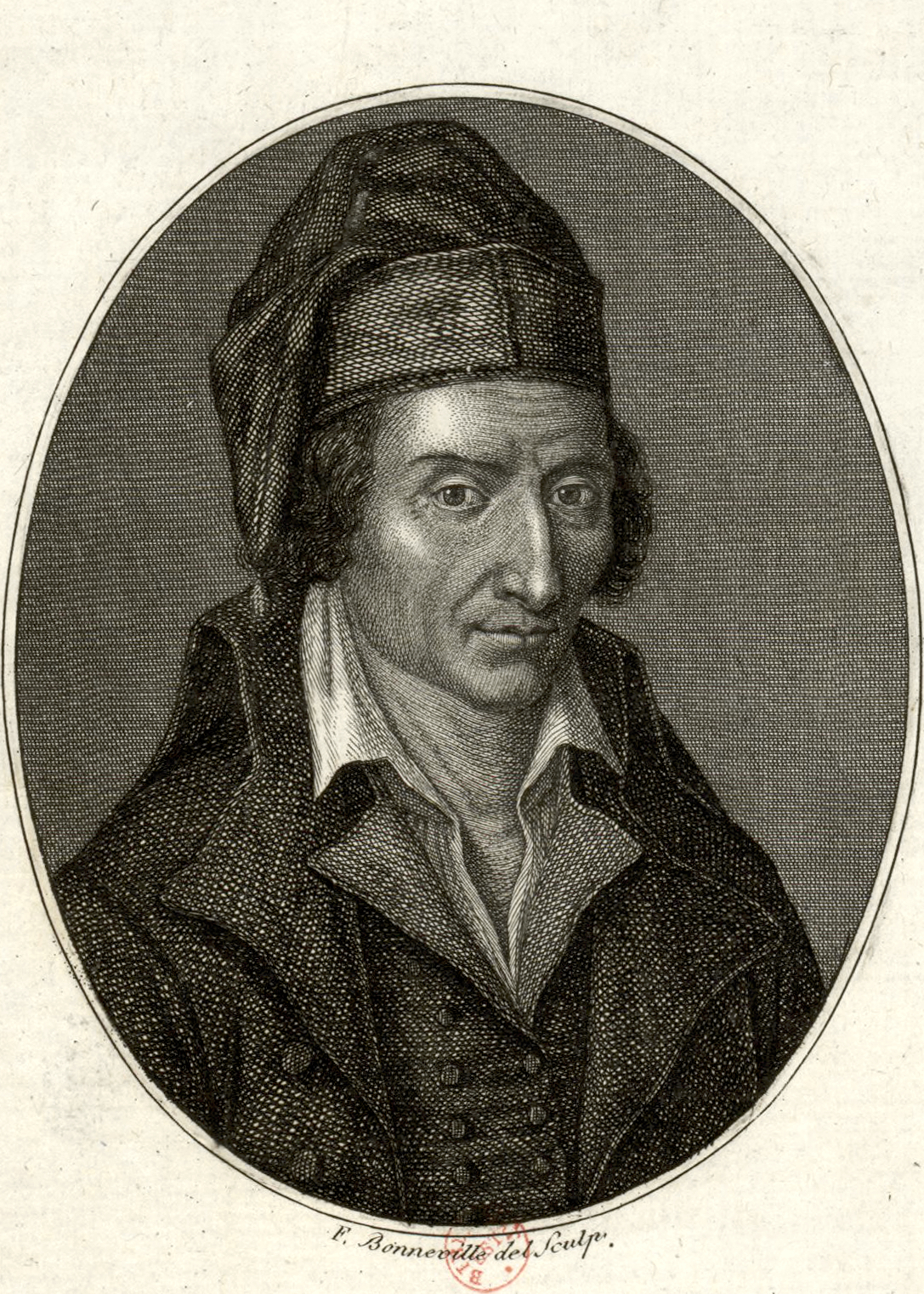 Louis Leroy dit Dix-Août / Né a Coulommiers en 1743 / Juré au Tribunal Revolutionnaire depuis sa Création jusqu'au 10. Thermidor / Décapité le 18. Floréal l'an 3. de la République.